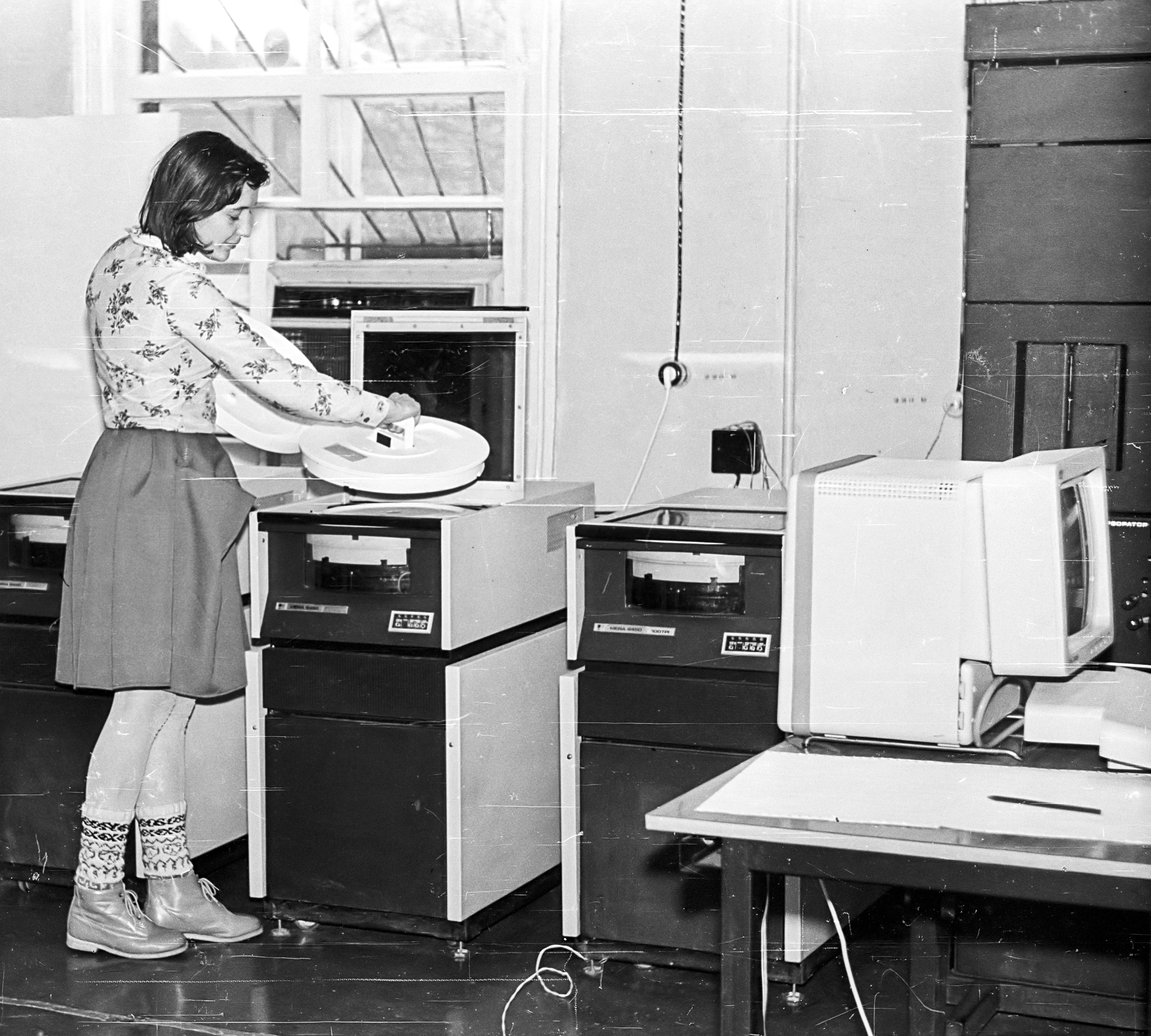 Елена Олеговна Бессонова, инженер лаборатории вычислительной техники и операционных систем, в процессе установки жесткого диска ёмкостью в 2,4 мегабайта. Скорее всего, диск ИЗОТ болгарского производства. Тумбочки — стойки для жёстких дисков, в каждой стойке по одному сменному диску. — В 2008 году Елена Бессонова работает дизайнером в полиграфии. Трое детей. — Помещение: первый 2-этажный корпус, 1 этаж, левое крыло, вычислительный центр ФИПКАН на Ботике, 1 корпус. — Филиал Института проблем кибернетики АН СССР, с августа 1986 Институт программных систем АН СССР. Село Веськово близ Переславля.